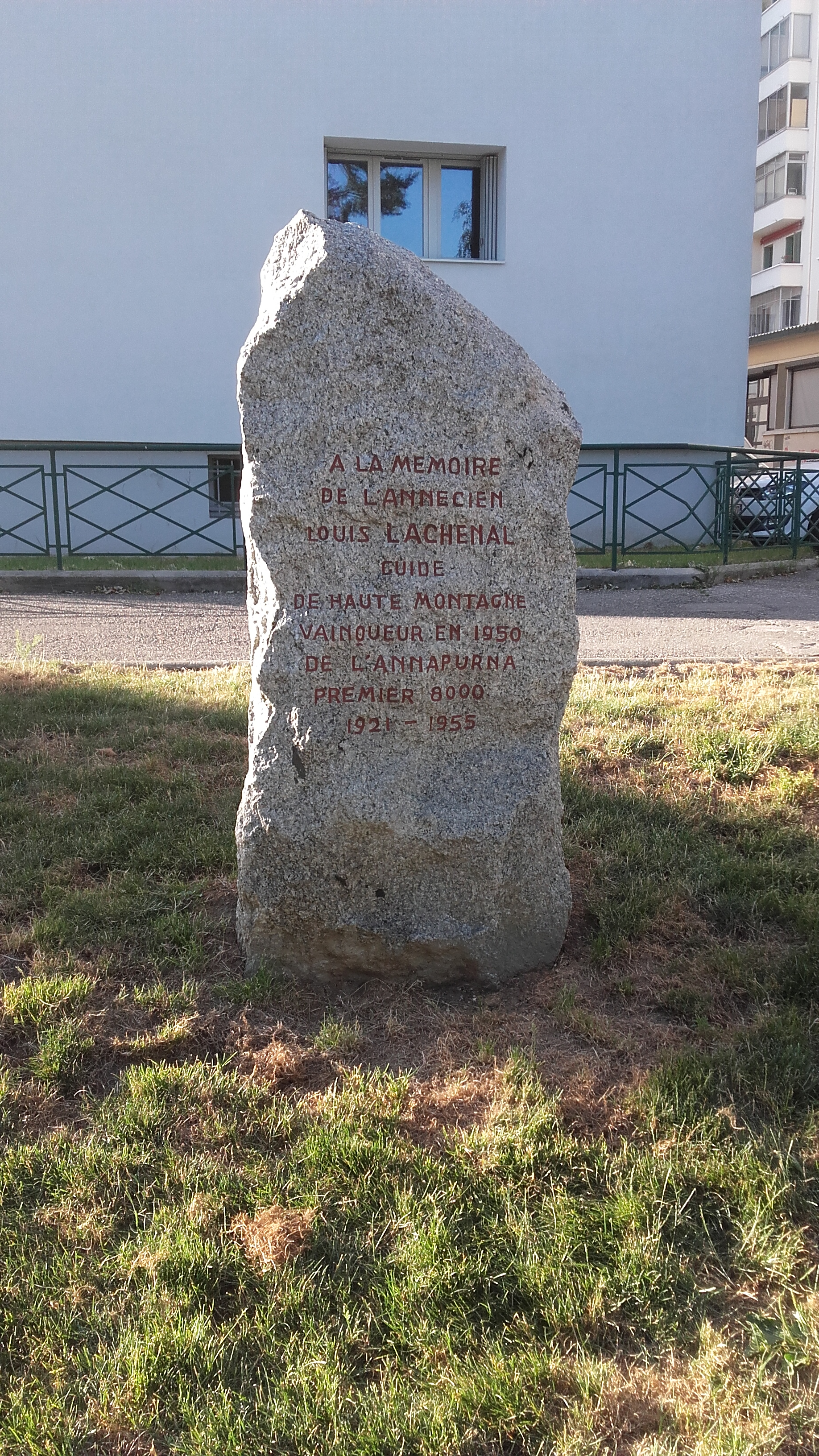 Pierre commémorative à la mémoire de Louis Lachenal située à Annecy sur la promenade Louis Lachenal